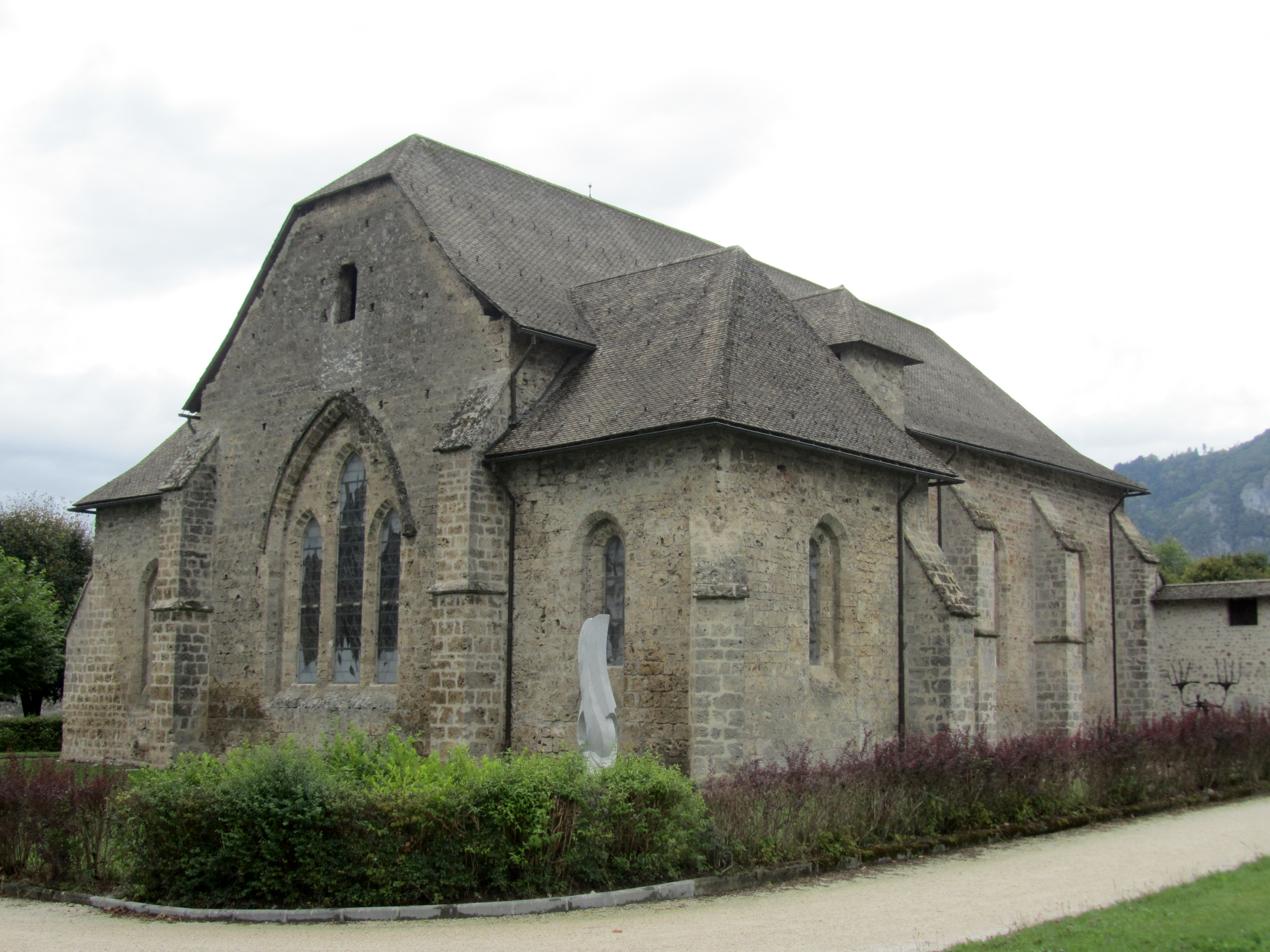 la Chartreuse de Mélan, une abbaye de Taninges